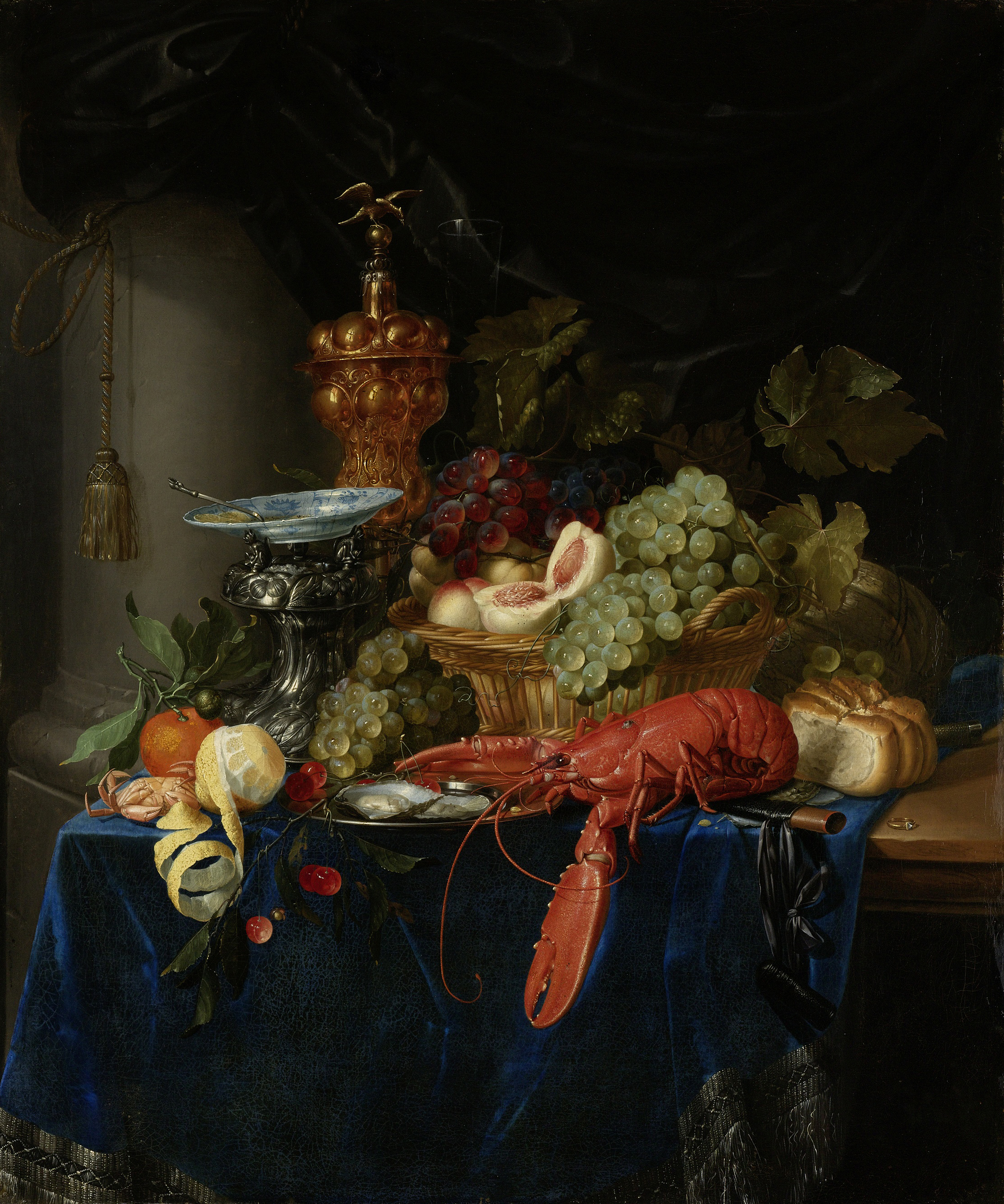 Stilleven met een gouden pronkbokaal, een zilveren houder waarop een Chinese schotel staat, een sinaasappel, een geschilde citroen, druiven, perziken, een kreeft, een bord met oesters en een broodje.